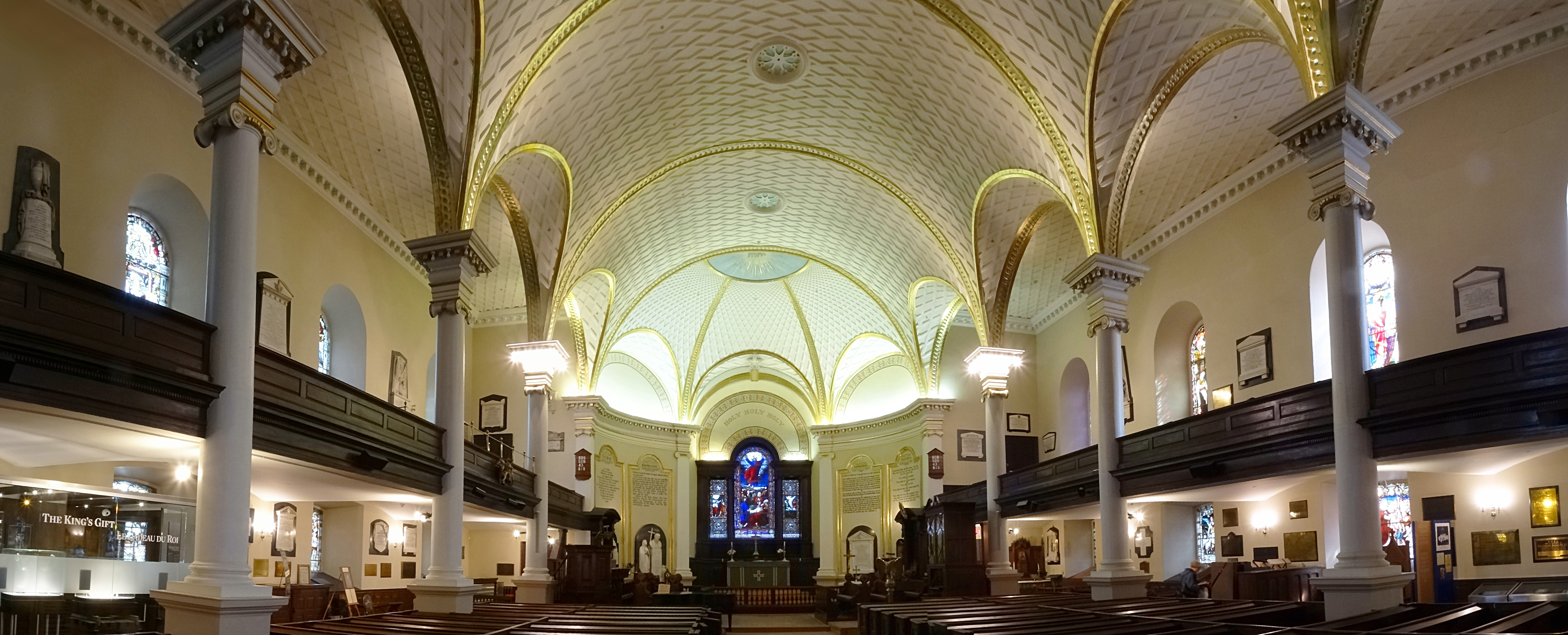 anglikanische Kathedrale der Heiligen Dreifaltigkeit, Innenraum-Panorama